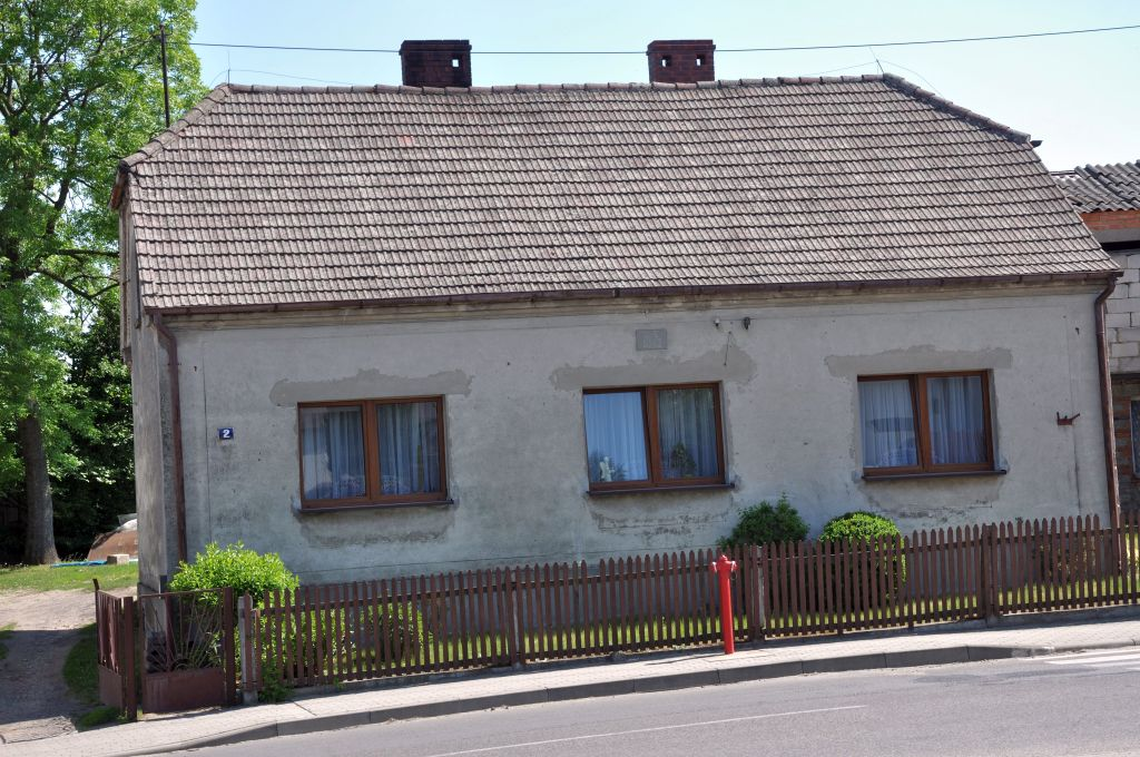 Dawny budynek SG w Wójcinie, widok z 2018 r.